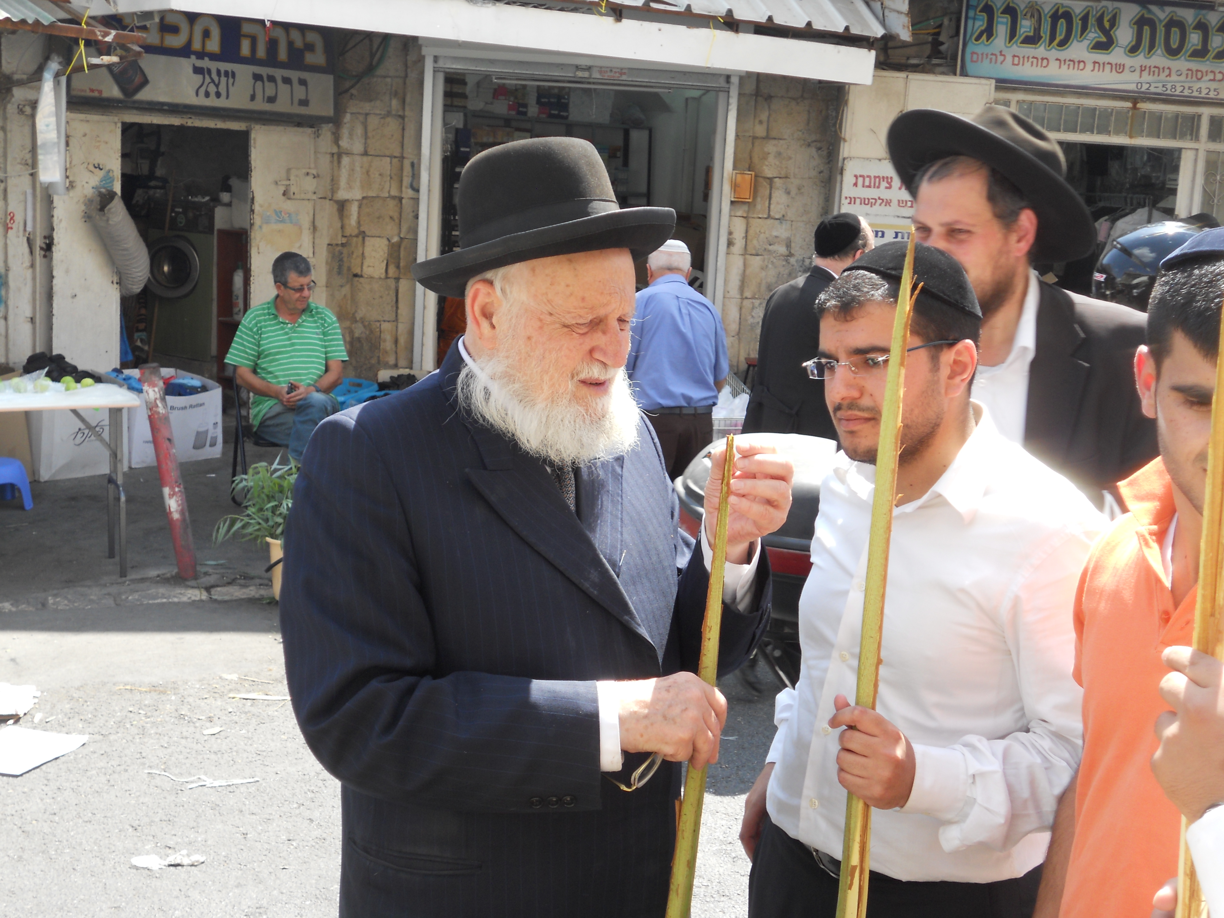 הרב יעקב פרץ בשוק ארבעת המינים בבוכרים